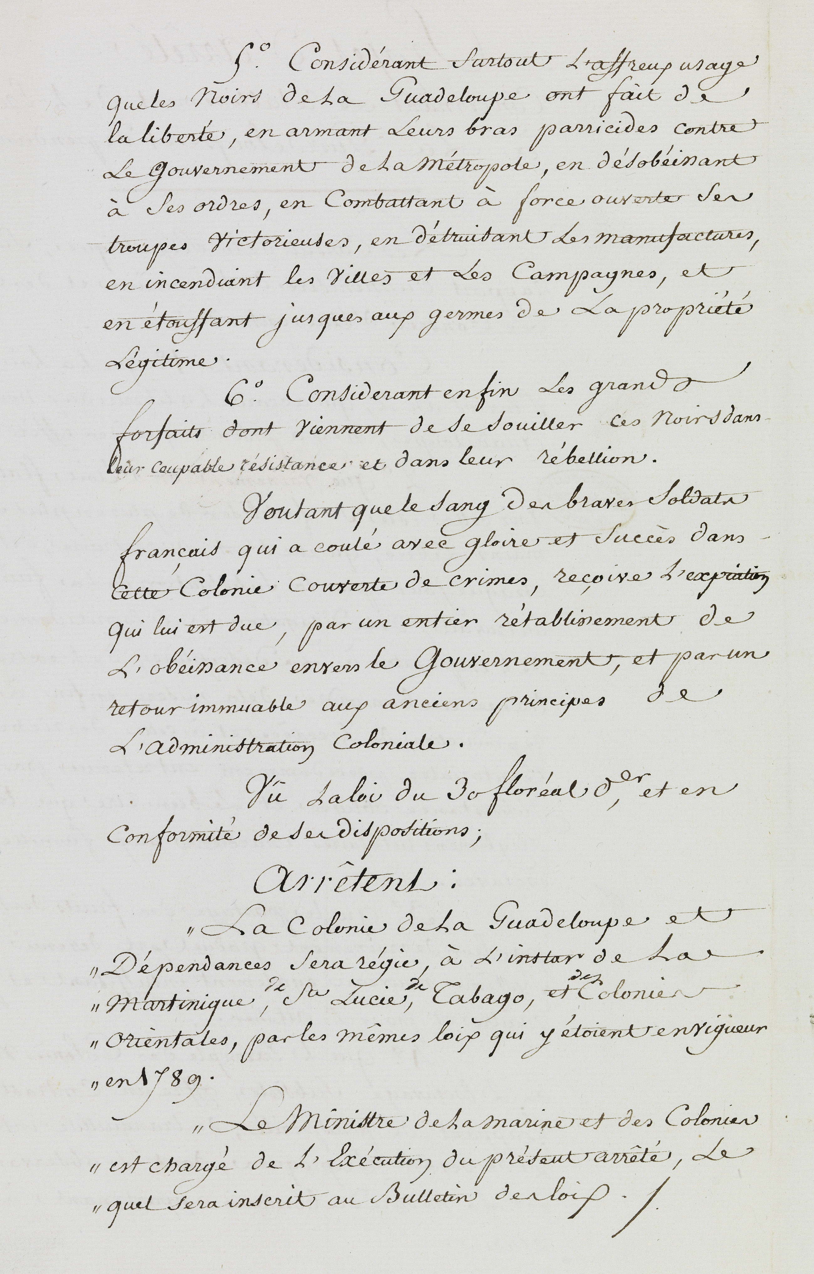 Arrêté consulaire de Bonaparte rétablissant l'esclavage à la Guadeloupe du 16 juillet 1802 : "Projet d'arrêté", manuscrit, p. 2 (AN AF IV, 379)